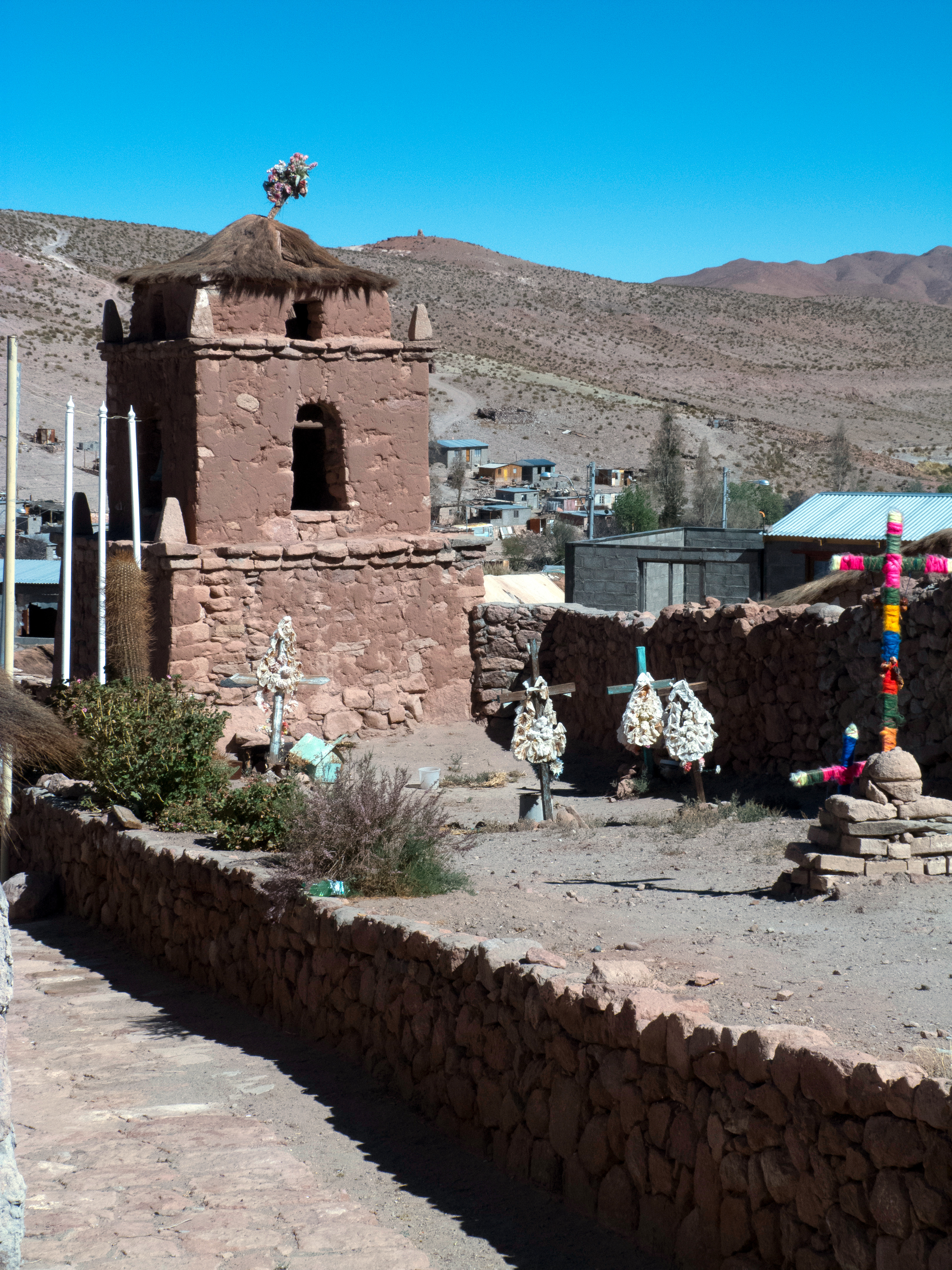 Campanario de la Iglesia de Caspana This is a photo of a national monument in Chile: 300